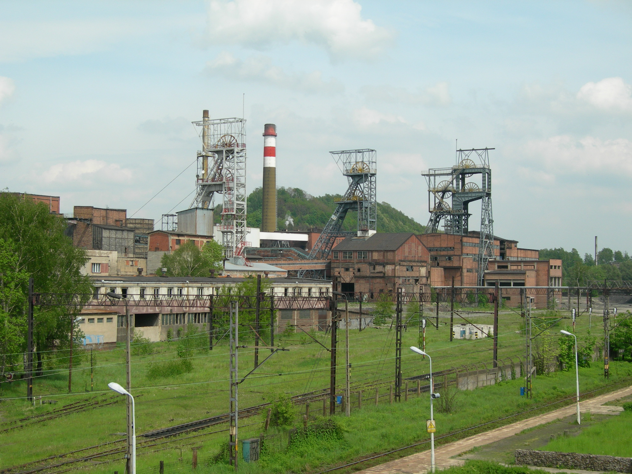 Zabudowania zamkniętej KWK Dębieńsko w mieście Czerwionka-Leszczyny.